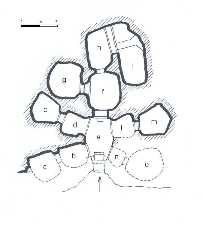 Sassari - Necropoli di Ponte Secco - Tomba delle protomi - Pianta